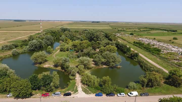 Baltă de pescuit sportiv si agrement administrată de Asociația Pescarul Macean.